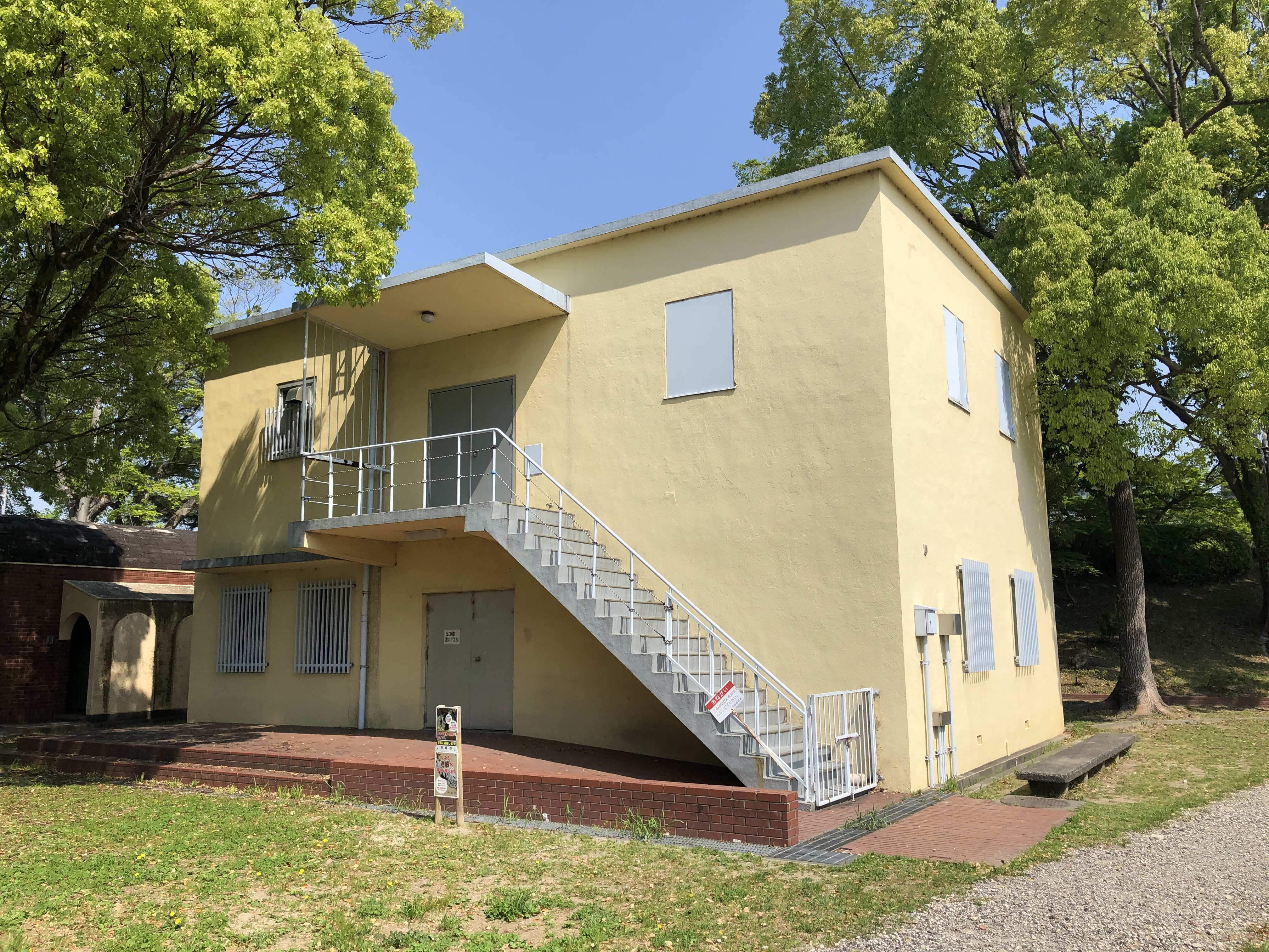 明代公園（岡崎市明大寺本町）。1966年に建てられた旧児童館の建物。